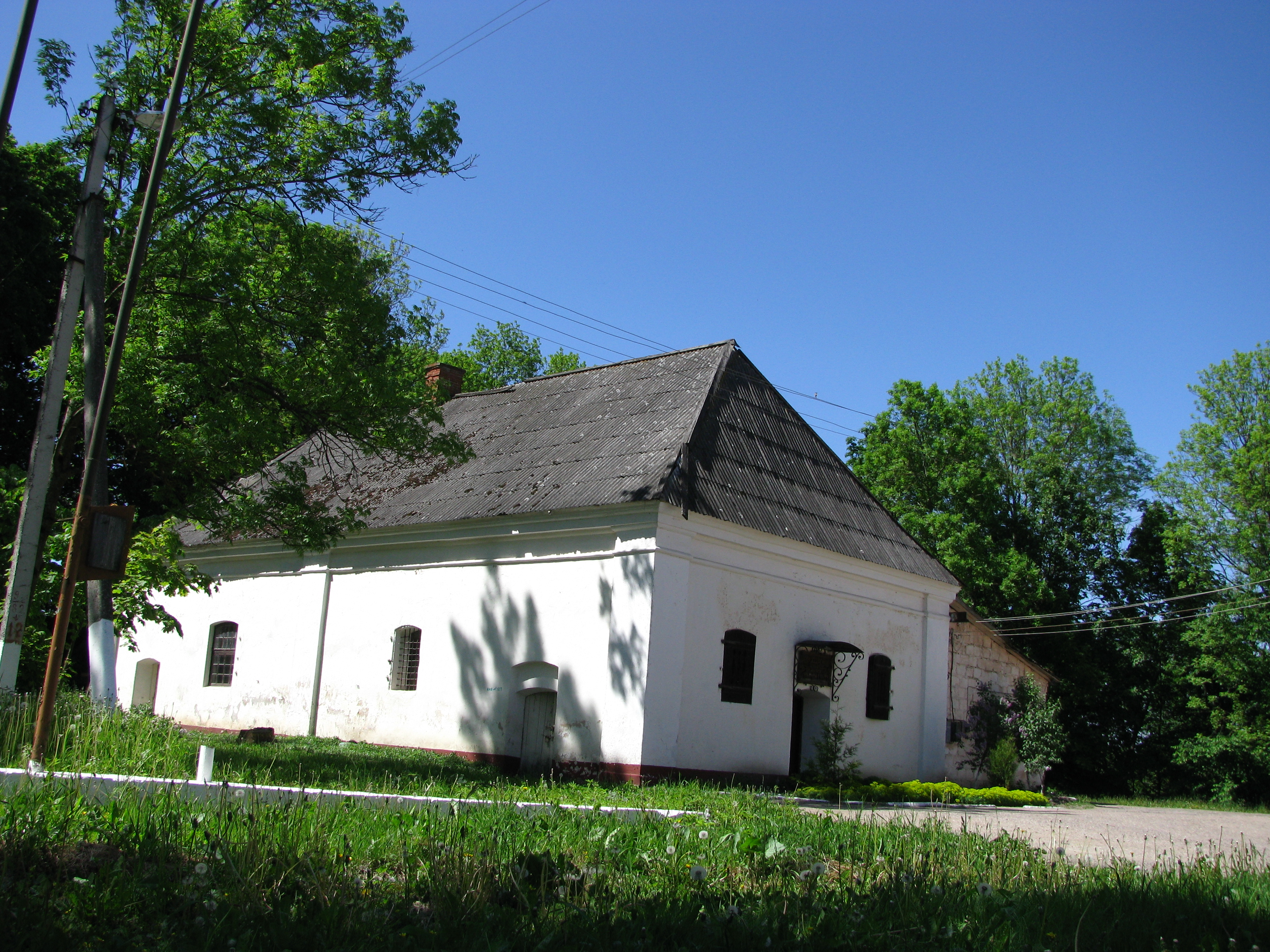 Беларуская (тарашкевіца): Комплекс былой сядзібыЗіберг-Плятэра:палац капліцагаспадарчыя пабудовыуязная брама. в. Гарадзец This is a photo of Belarusian heritage monument. Reference number: 212Г000836 ( WLM)